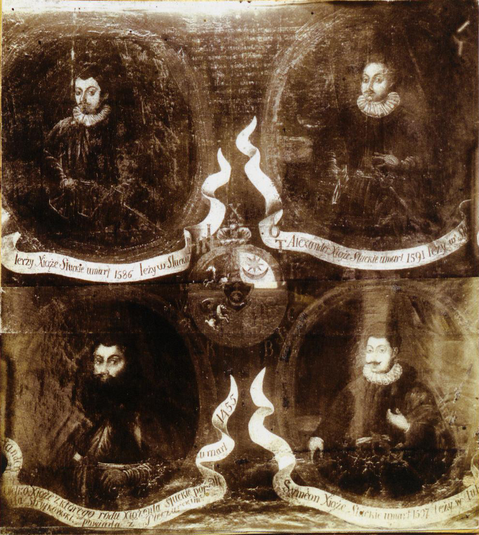 Беларуская (тарашкевіца): Партрэты князёў Алелькавічаў (Alelkavič): Аляксандар (Алелька) Уладзімеравіч (1411—1454), Юры ІІІ (1559—1586), Ян Сямён, Аляксандар.